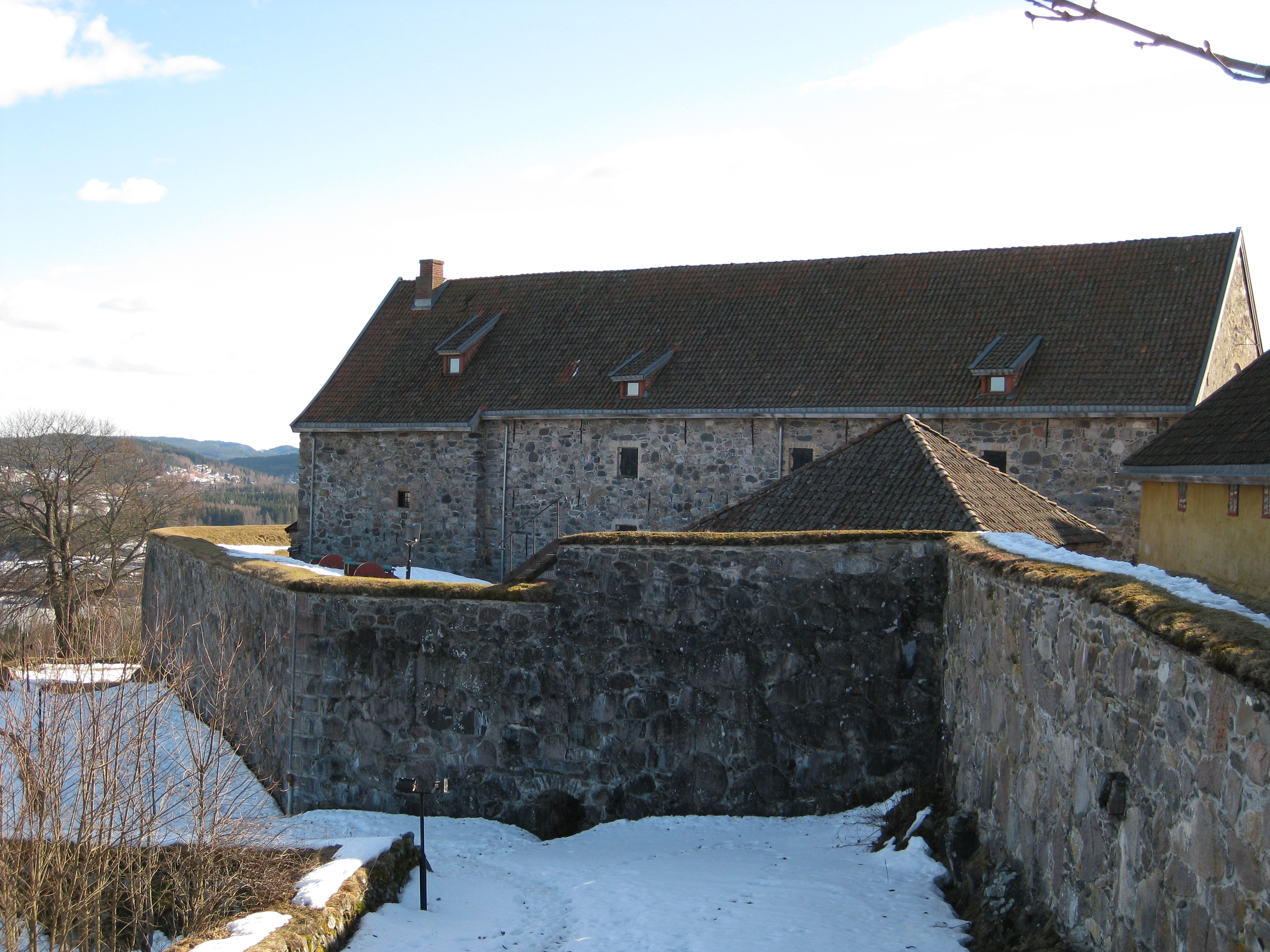 Kongsvinger festning og Prinsessens bastion med kruttårnets batteri (kanoner) i forgrunnen. I bakgrunnen mot murens spiss ligger Prindsessens batteri, som igjen er plassert ved siden av endeveggen til bakeriet fra 1721 og provianthuset fra 1682 (vegg-i-vegg). Spisstaket midt i bildet til høyre er det lille kruttårnet fra 1682. Det gule bygget helt til høyre er kommandantens stall og fehus fra 1743. Kilde